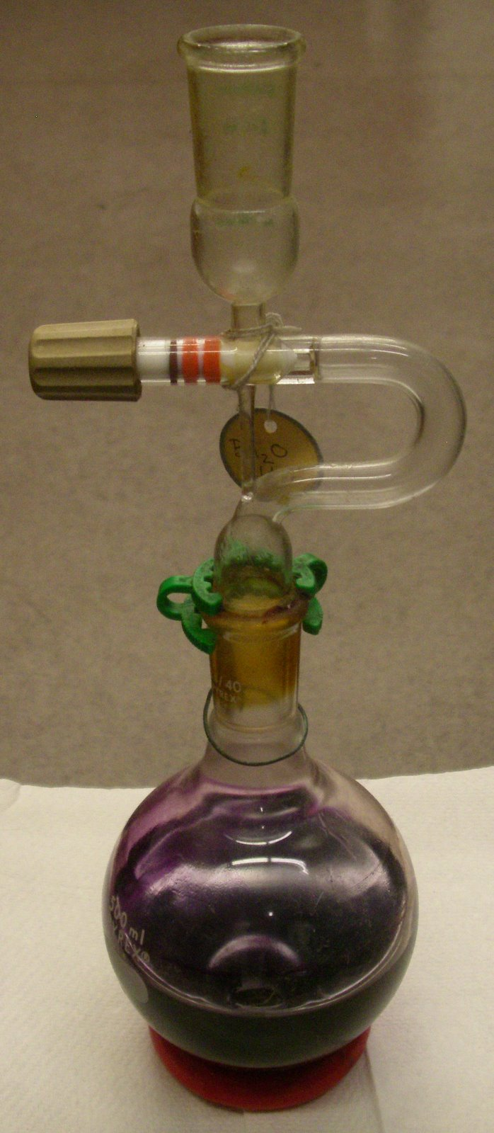 Solvent pot